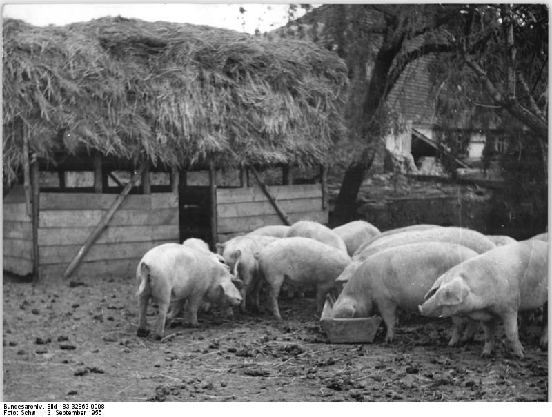 Zentralbild-Schw. Wjt-Qu 13.9.1955 Mehr Schweinefleisch durch vorbildliche Viehhaltung und Viehpflege LFG "Friedrich Engels" in Scharfenberg, Kreis Meißen. Durch umsichtiges, planvolles Arbeiten konnte die LFG "Friedrich Engels" in Scharfenberg den Plan für die Vermehrung des Viehbestandes bei weitem übererfüllen. Besonders in der Schweinehaltung, der Zucht von gut essbaren Schweinerassen und dem damit verbundenen Aufbau sauberer Stallungen leistet die LPG, auf der die neuesten Erkenntnisse der Wissenschaft auf dem Gebiet der Viehzucht angewendet werden, ausserordentliches. UBz: Naturhafte Haltung in Hütten mit großem Auslauf für Jungsauen sorgen dafür, dass gesunde und widerstandskräftige Zuchtsauen heranwachsen.